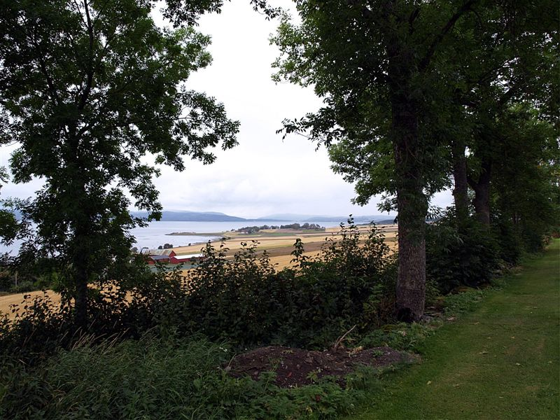 Alstadhaug kirke